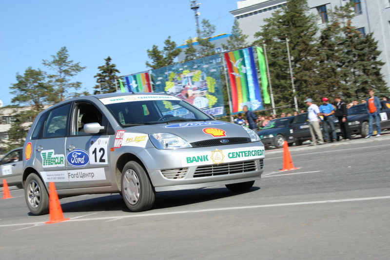 Рекордсмен по количеству побед в павлодарских гонках - Андрей Вирчик на Ford Fiesta 1.4